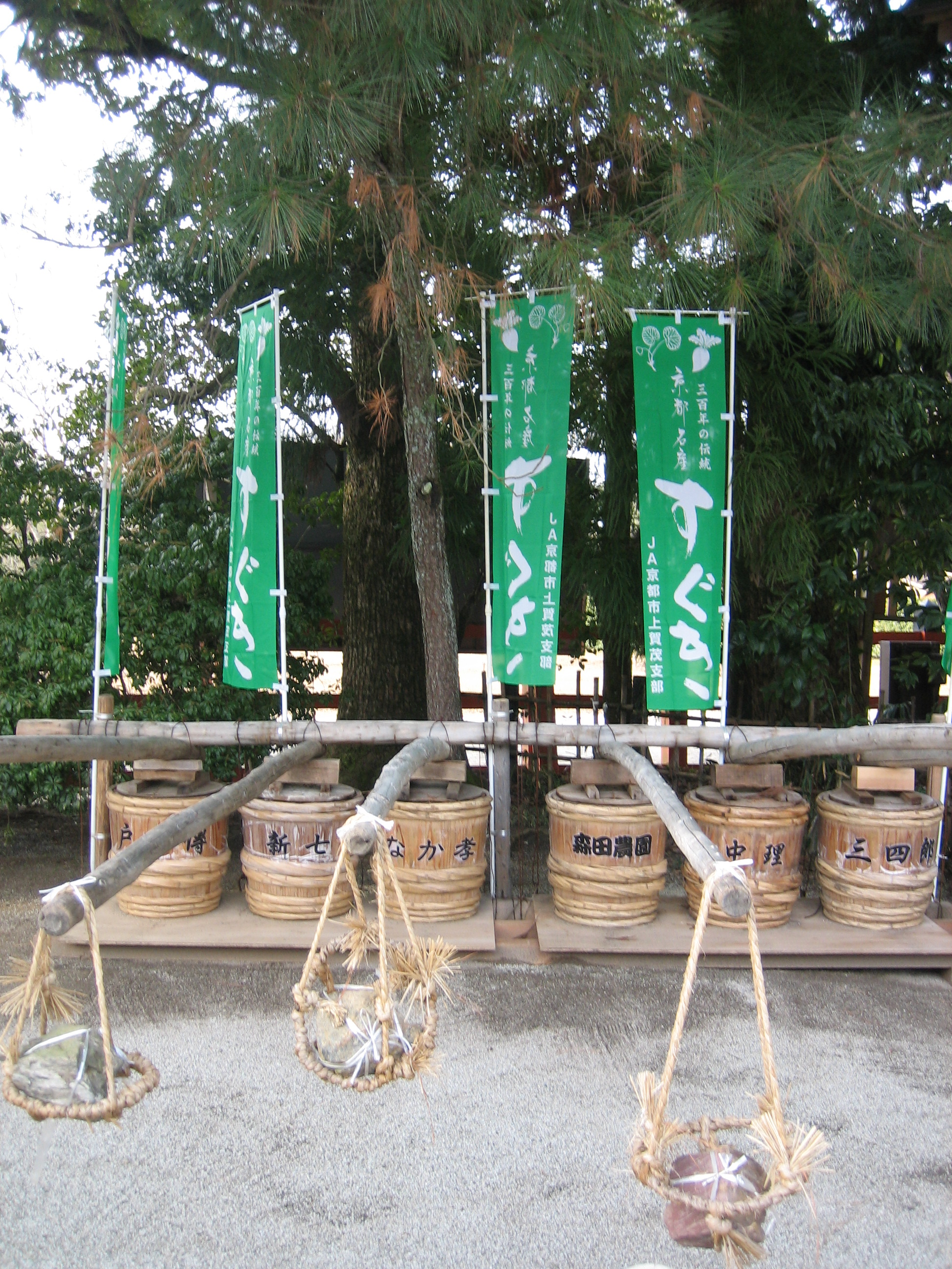 「すぐきの天秤押し」を上賀茂神社境内から撮影